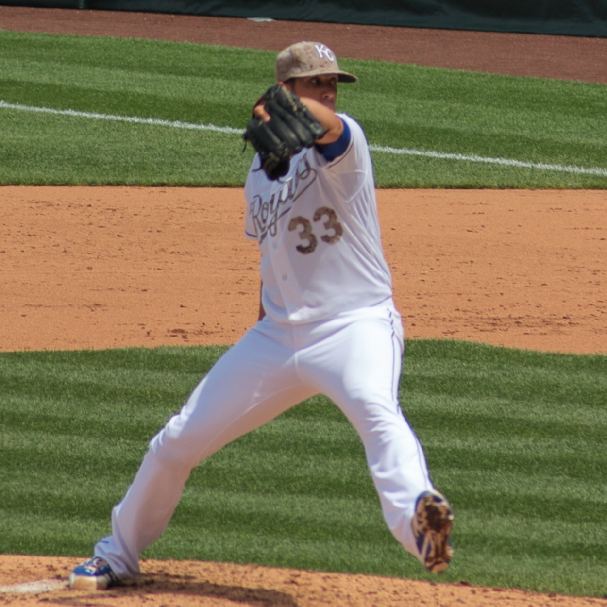 James Shields